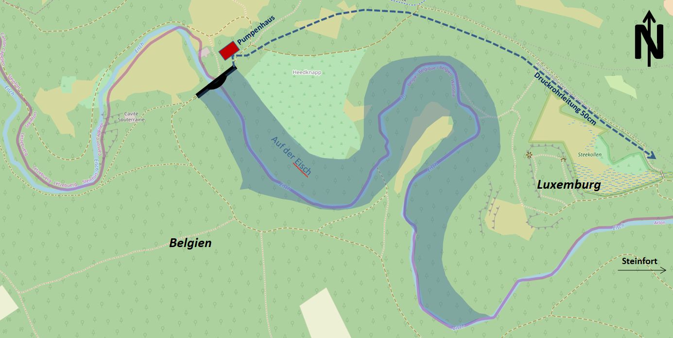 Ungefährer Lageplan des ehemaligen Stauweihers in Steinfort, Luxemburg.